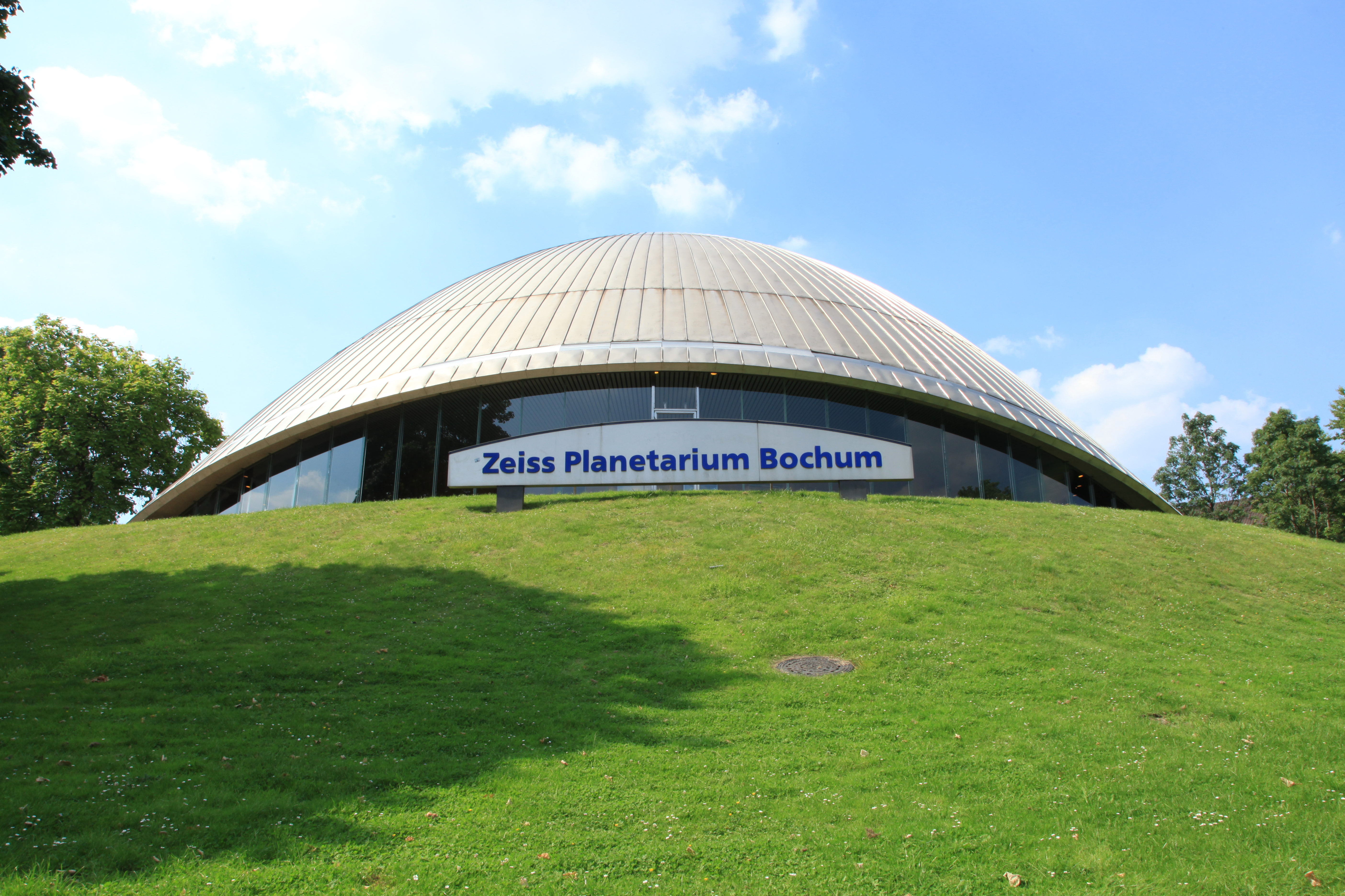 Zeiss Planetarium an der Castroper Straße in Bochum